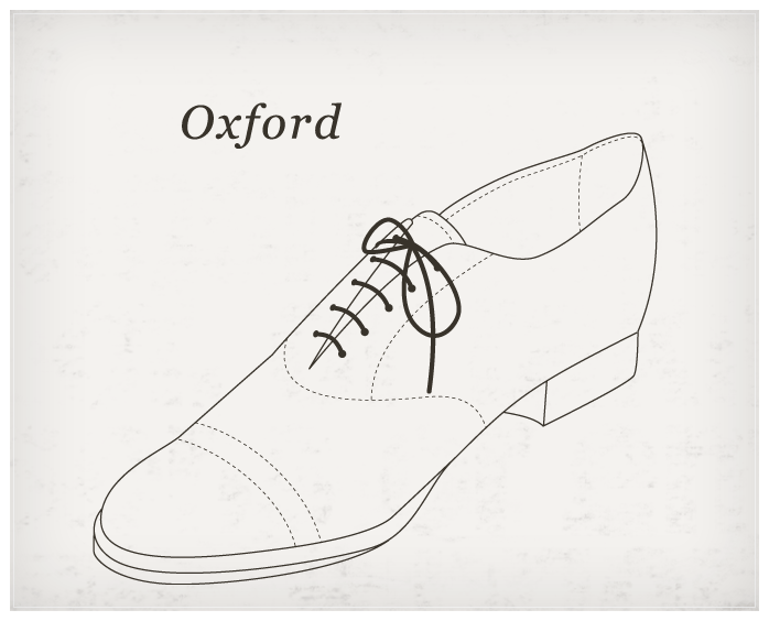 Das wohl eleganteste englische Herrenschuhmodell ist der Oxford. Für ihn typisch ist die geschlossene Schnürung.